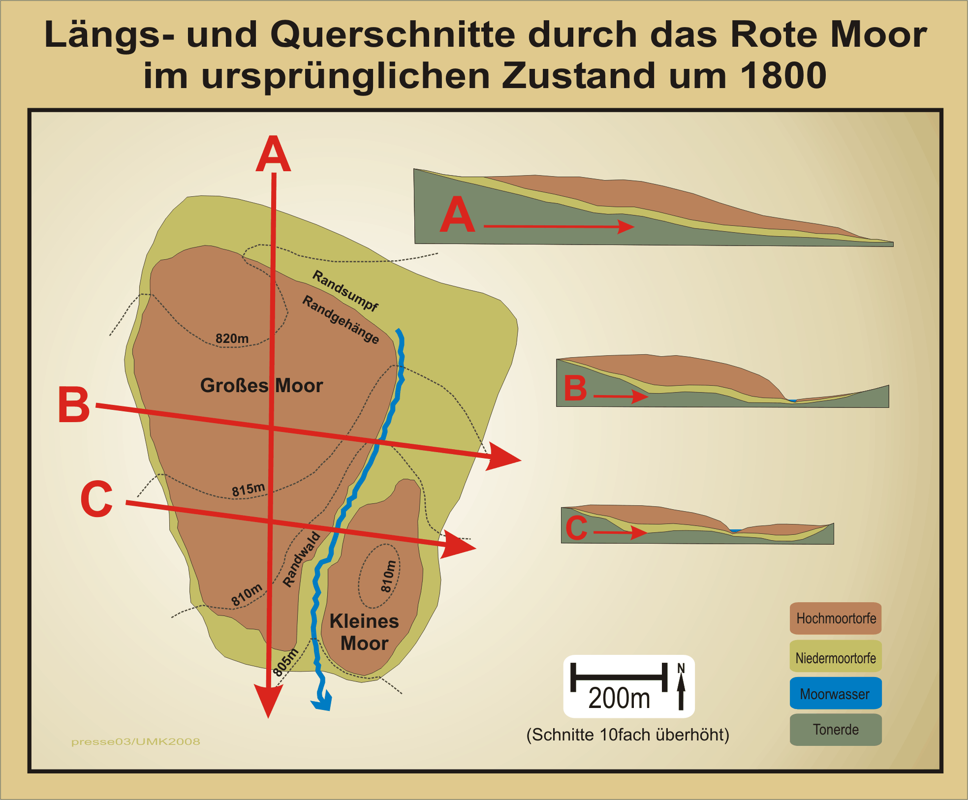 Längs- und Querschnitte durch das Rote Moor im ursprünglichen Zustand von 1800